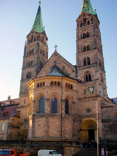 Il duomo di Bamberga